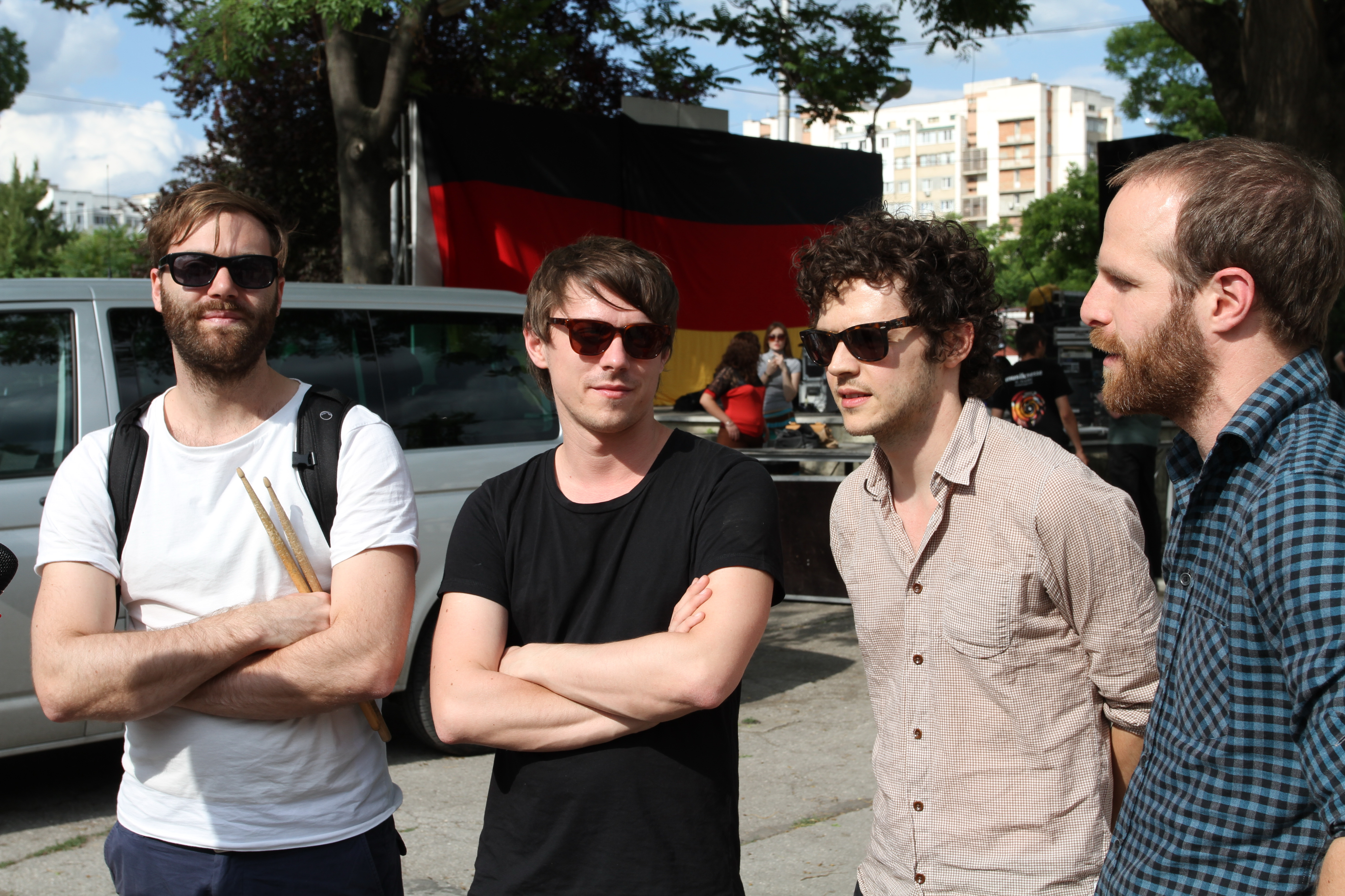 Fotos, eine Rockband aus Hamburg